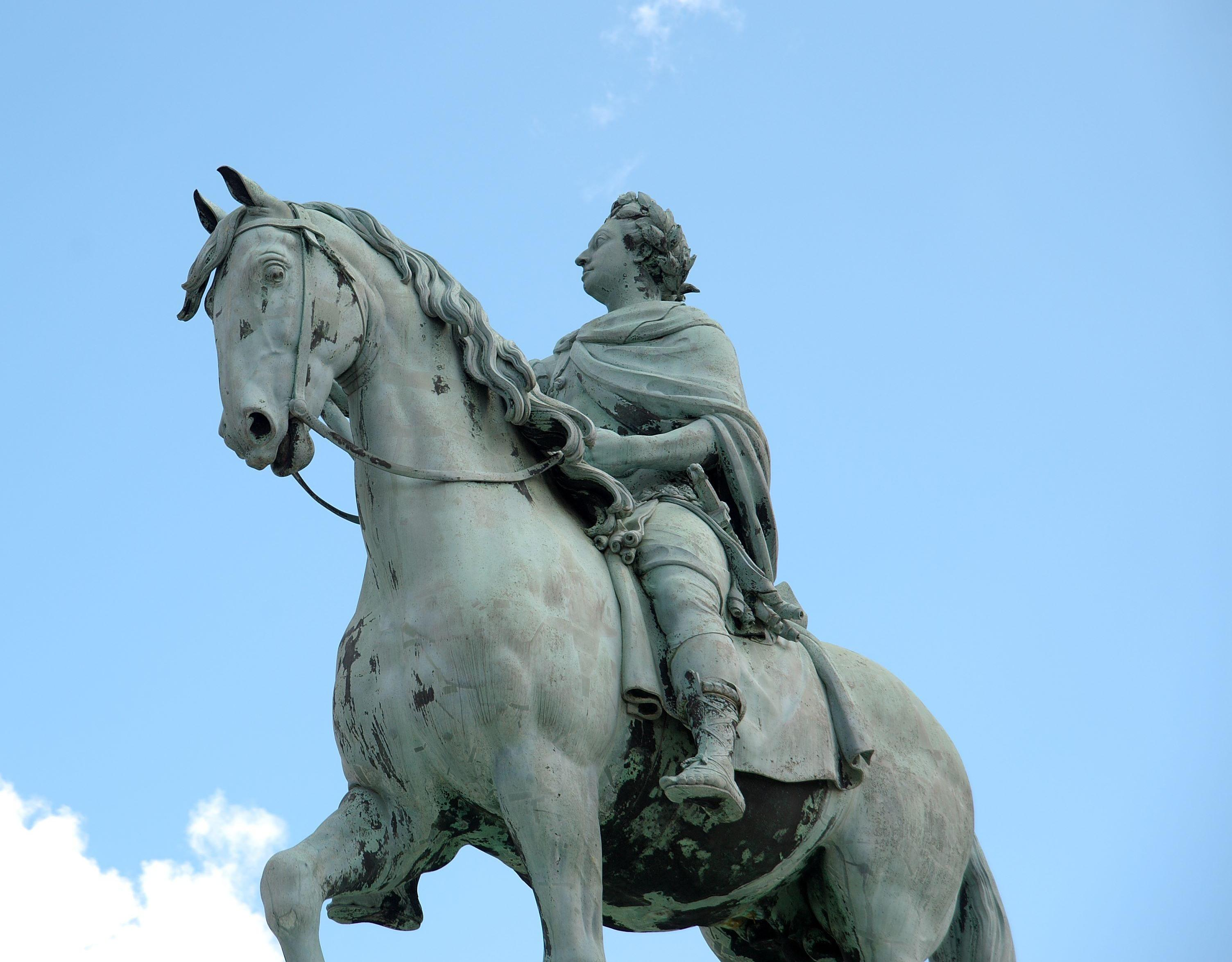 Salys Frederik V statue at Amalienborg Palace